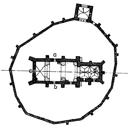 Planul bisericii si fortificatiei de la Boian.